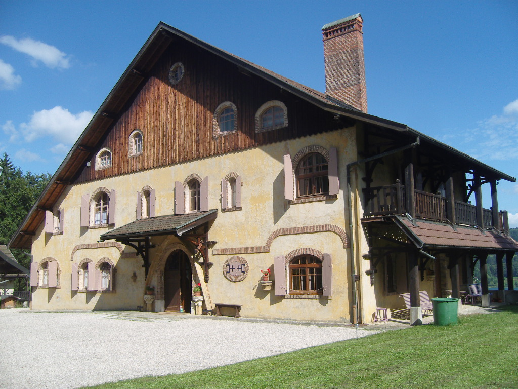 Les Grangettes (Doubs - France) - demeure de Monte-au-Lever, monument historique